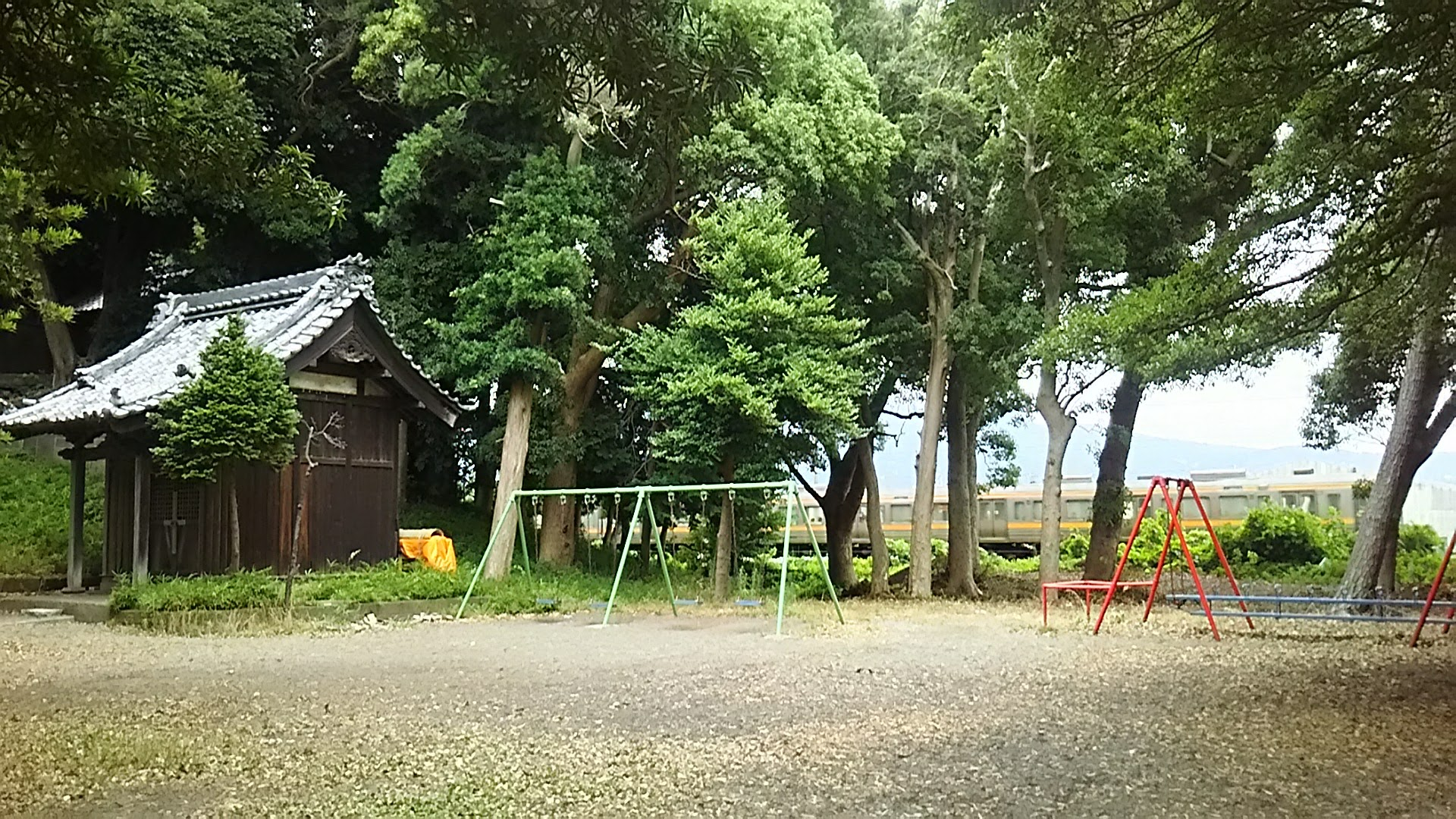 東側の公園から見神明塚古墳